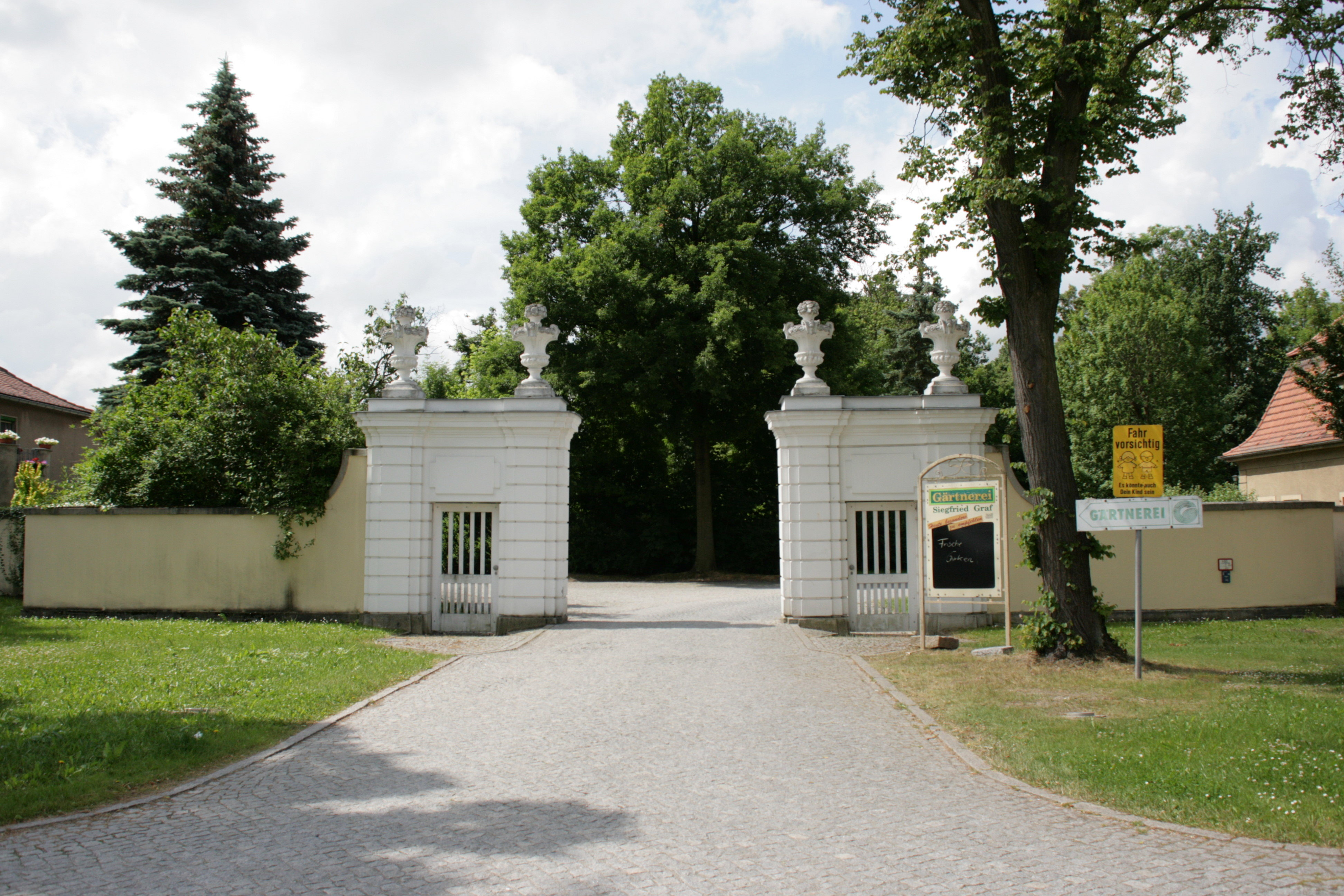 Am Markt (nicht am Park), Baruth bei Bautzen, Malschwitz